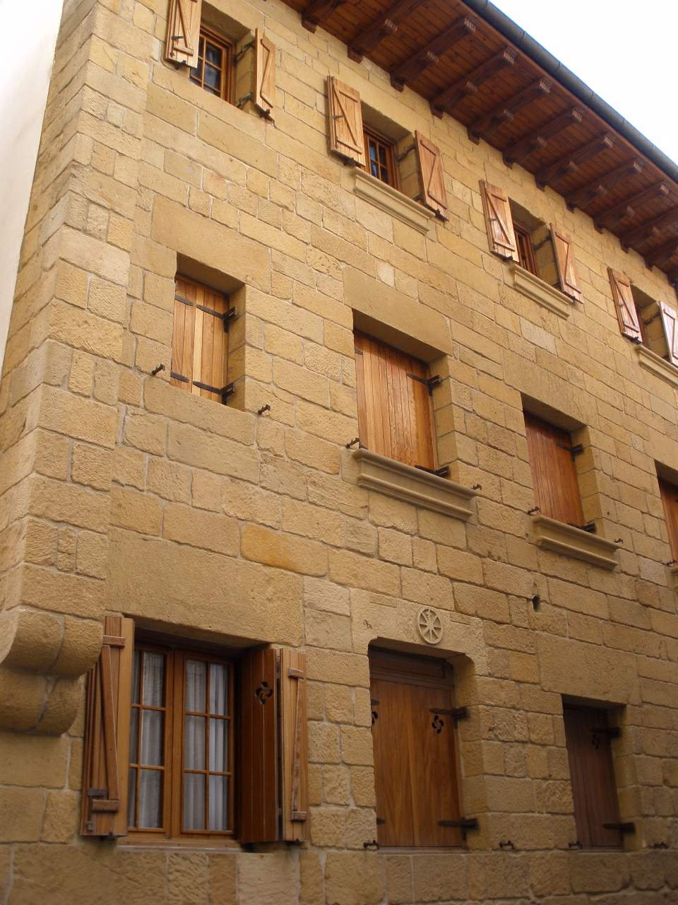 Orio (Gipuzkoa)